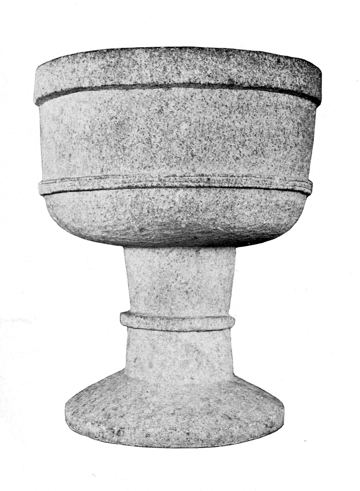 Lommelands kyrka. Dopfunt